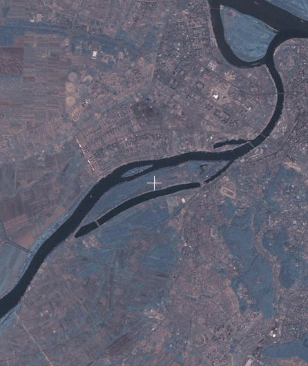 Satellite map of Ada Ciganlija in Belgrade